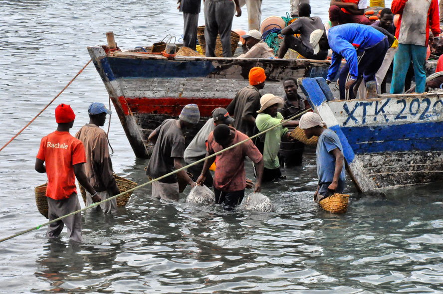 Dar es Salaam, Tanzania